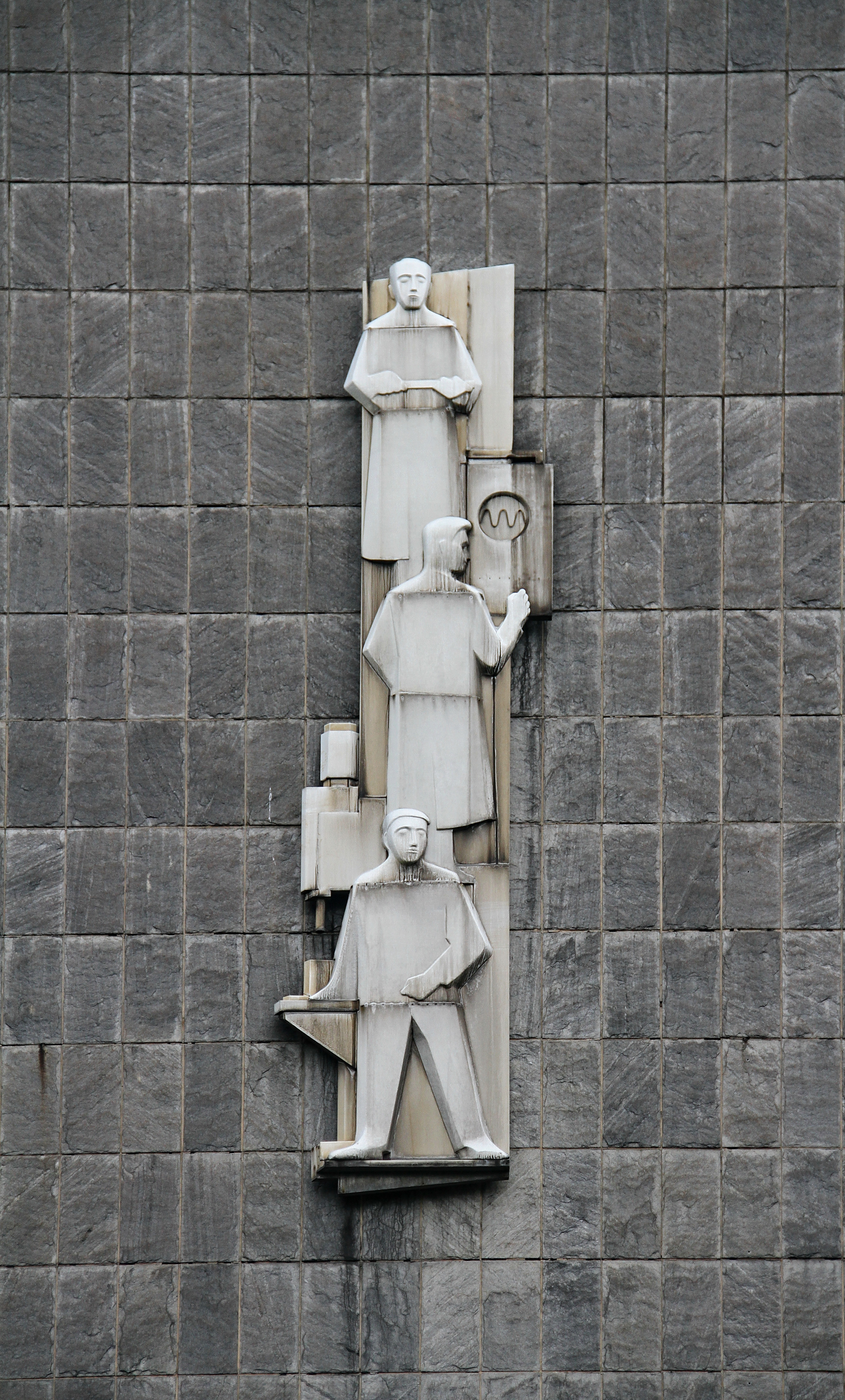 Kulturdenkmal 09202293 im Chemnitzer Stadtteil Altchemnitz, Annaberger Straße 231, ehemaliges Forschungszentrum des WErkzeugmaschinenbaus in Karl-Marx-Stadt, Fassadenrelief von Wilhelm Landgraf